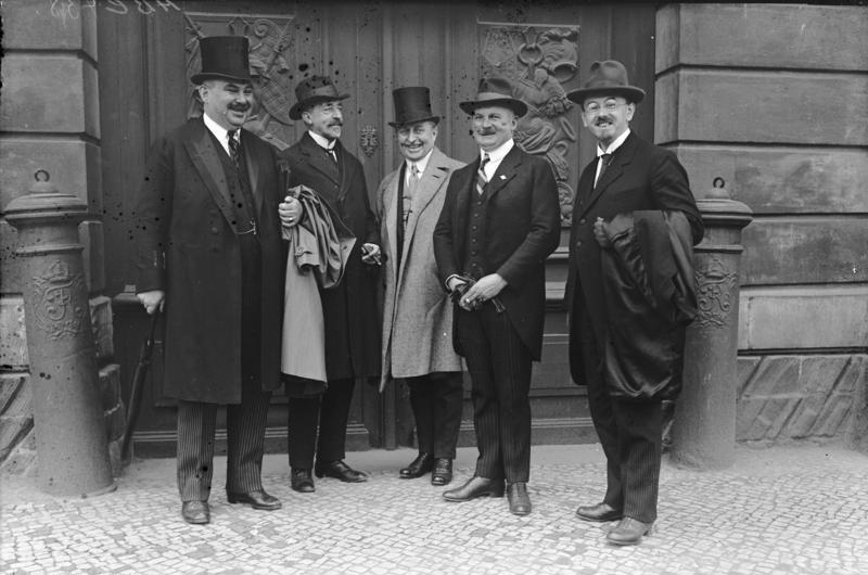 Die Eröffnungssitzung des neuen Reichstages in Berlin. Die Führer der Deutsch-Völkischen, v.li. n. re.: Abgeordneter Schliphake, Graf Bluhme und Hauptmann Böhm.